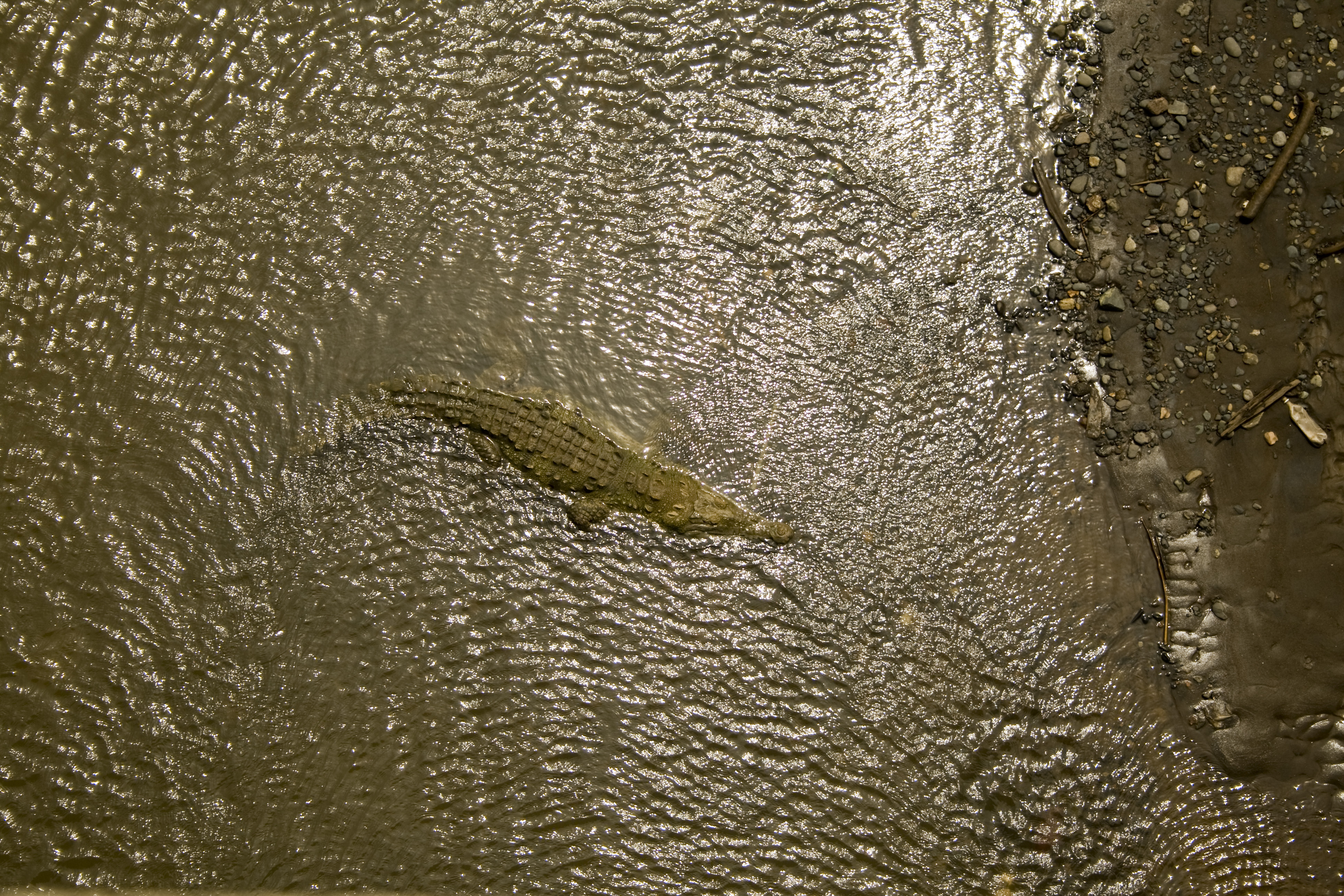 Cocodrilo en el Río Grande de Tárcoles, Puntarenas, Costa Rica.